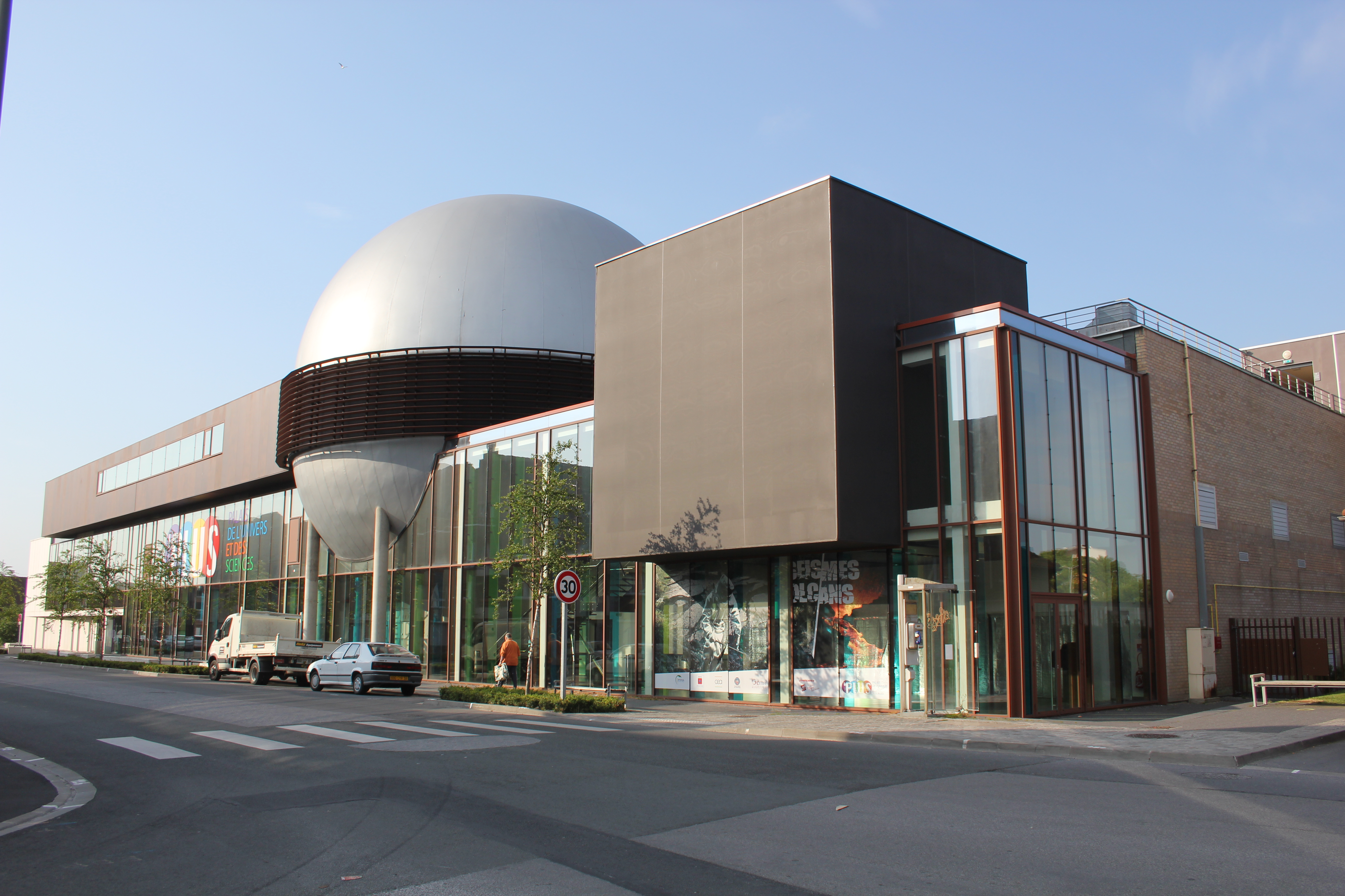 PLUS (Palais de l'Univers et des Sciences) Cappelle la Grande near Dunkerque - FRANCE